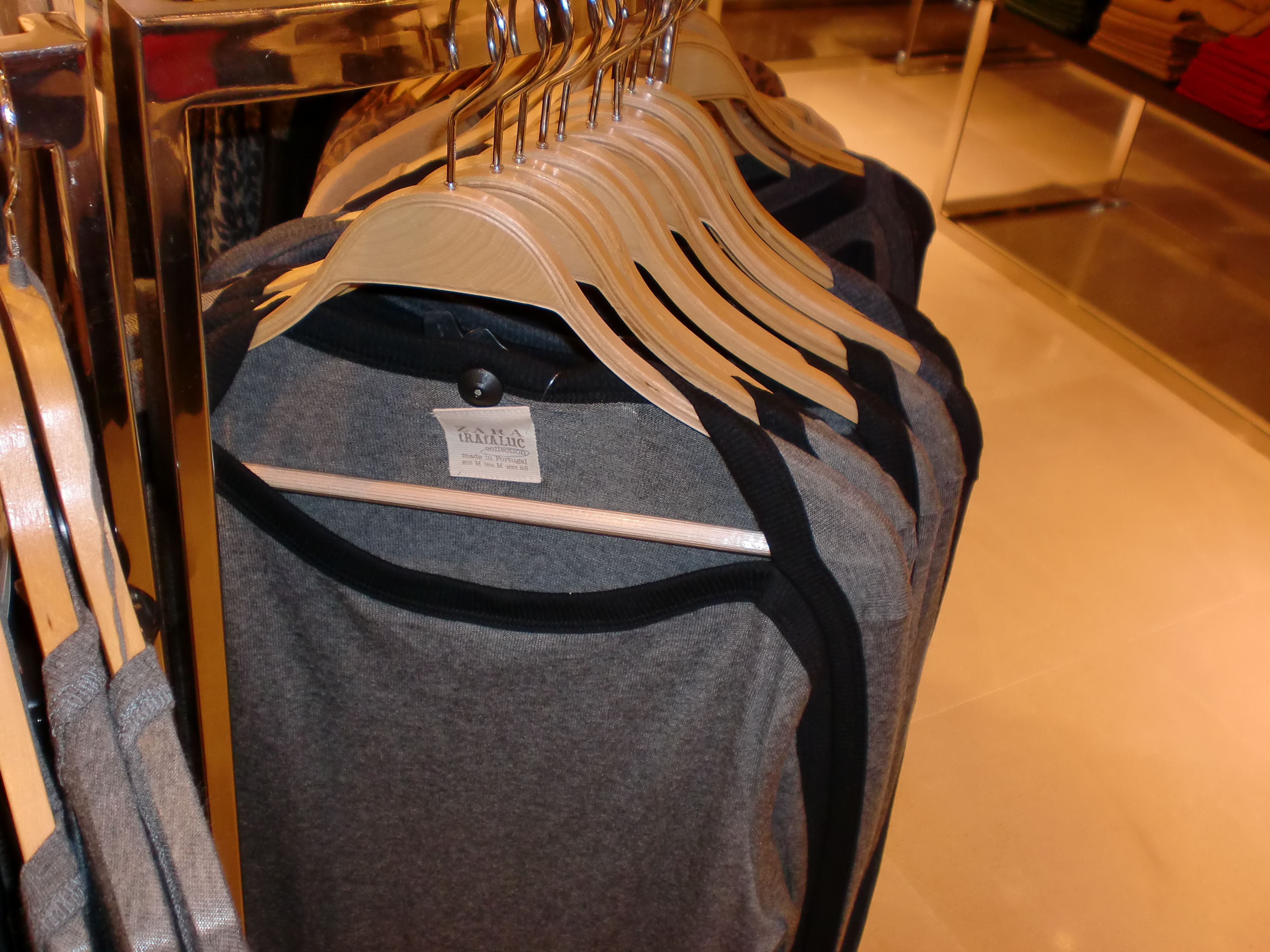 Roupas da marca Zara fabricadas em Portugal. Foto tirada no Fórum Coimbra.